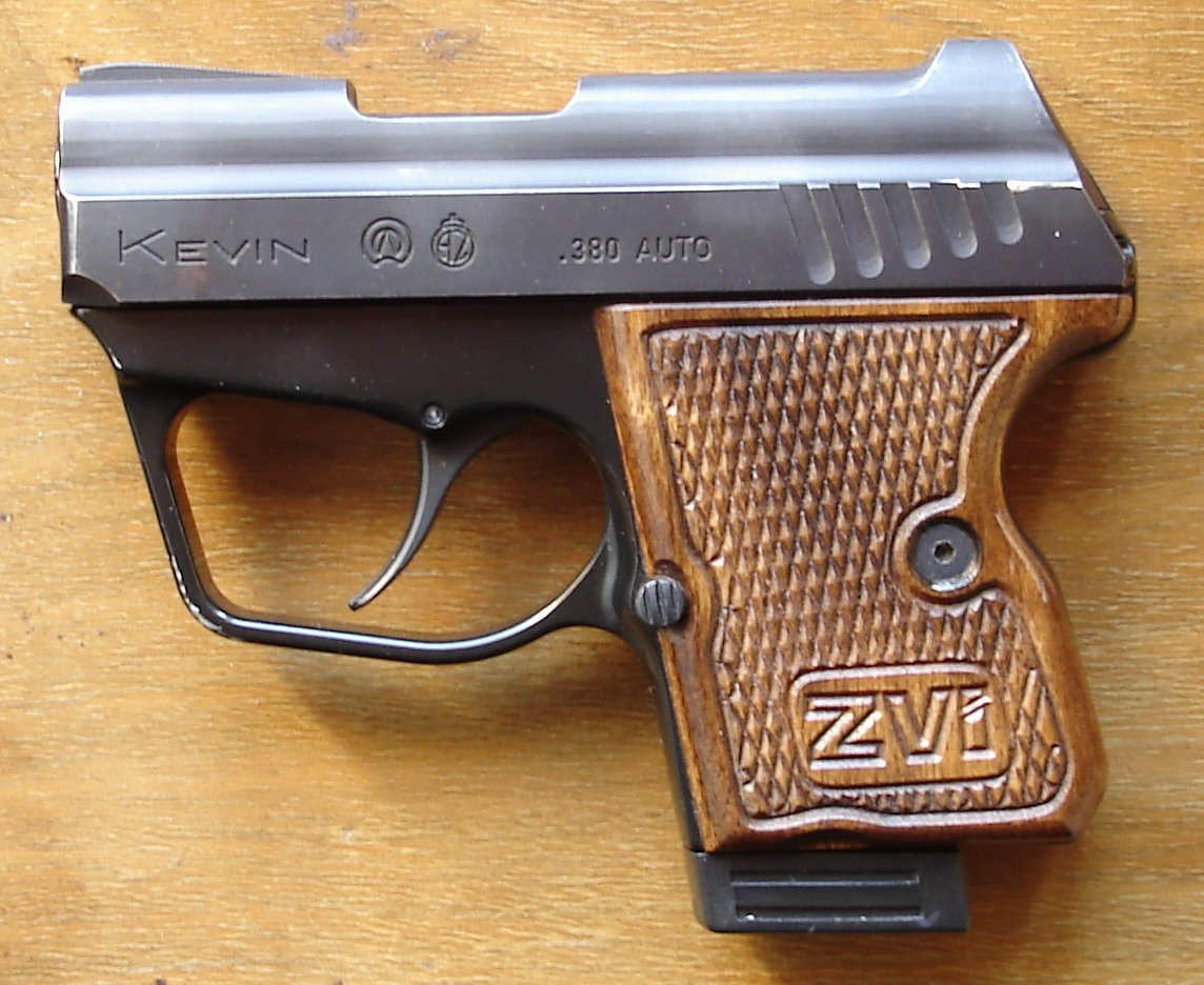 Fotografie samonabíjecí pistole Kevin.